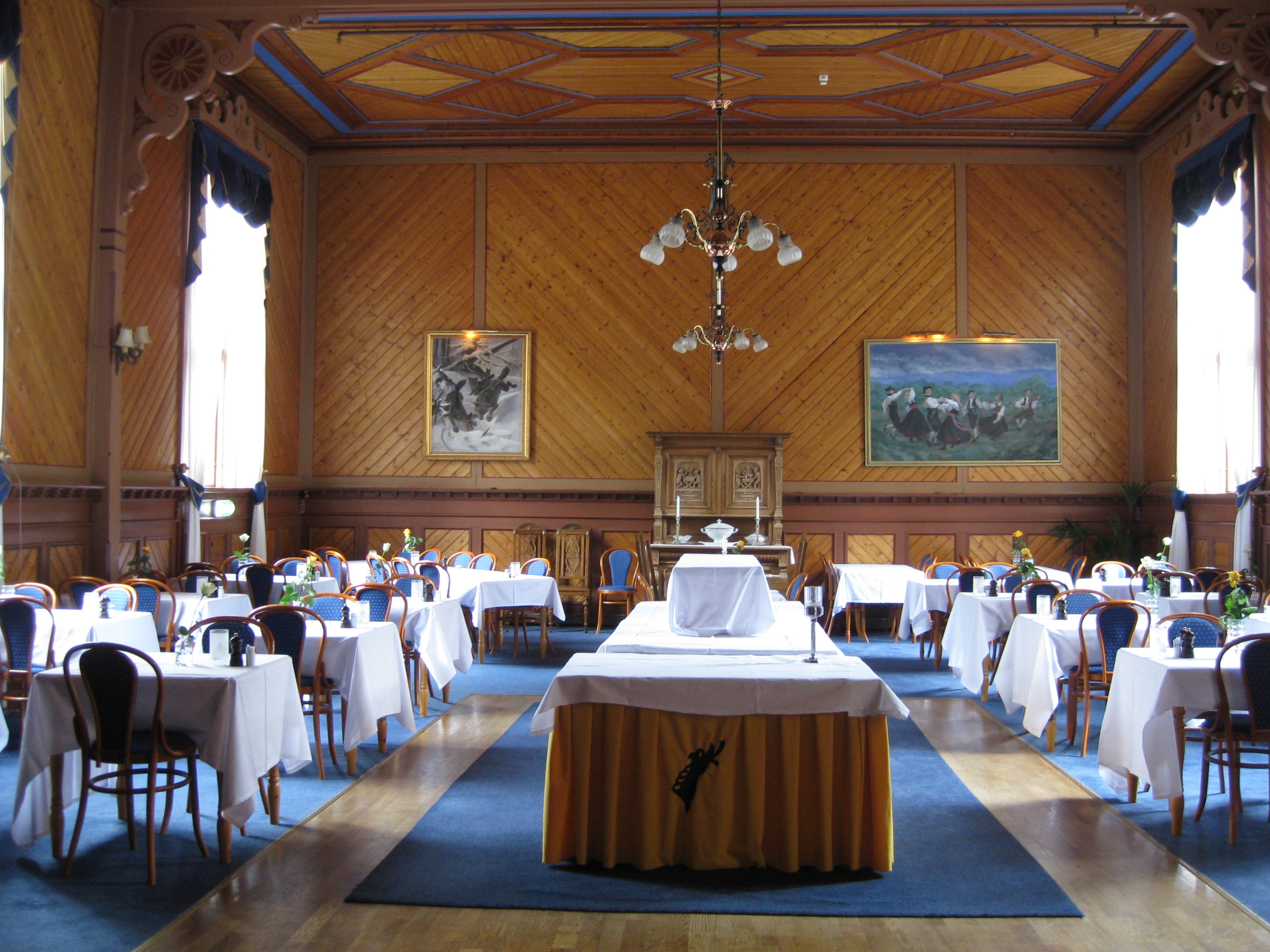 Interiør fra restauranten i Dalen Hotel. Hotellet ligger i Tokke kommune i Telemark.